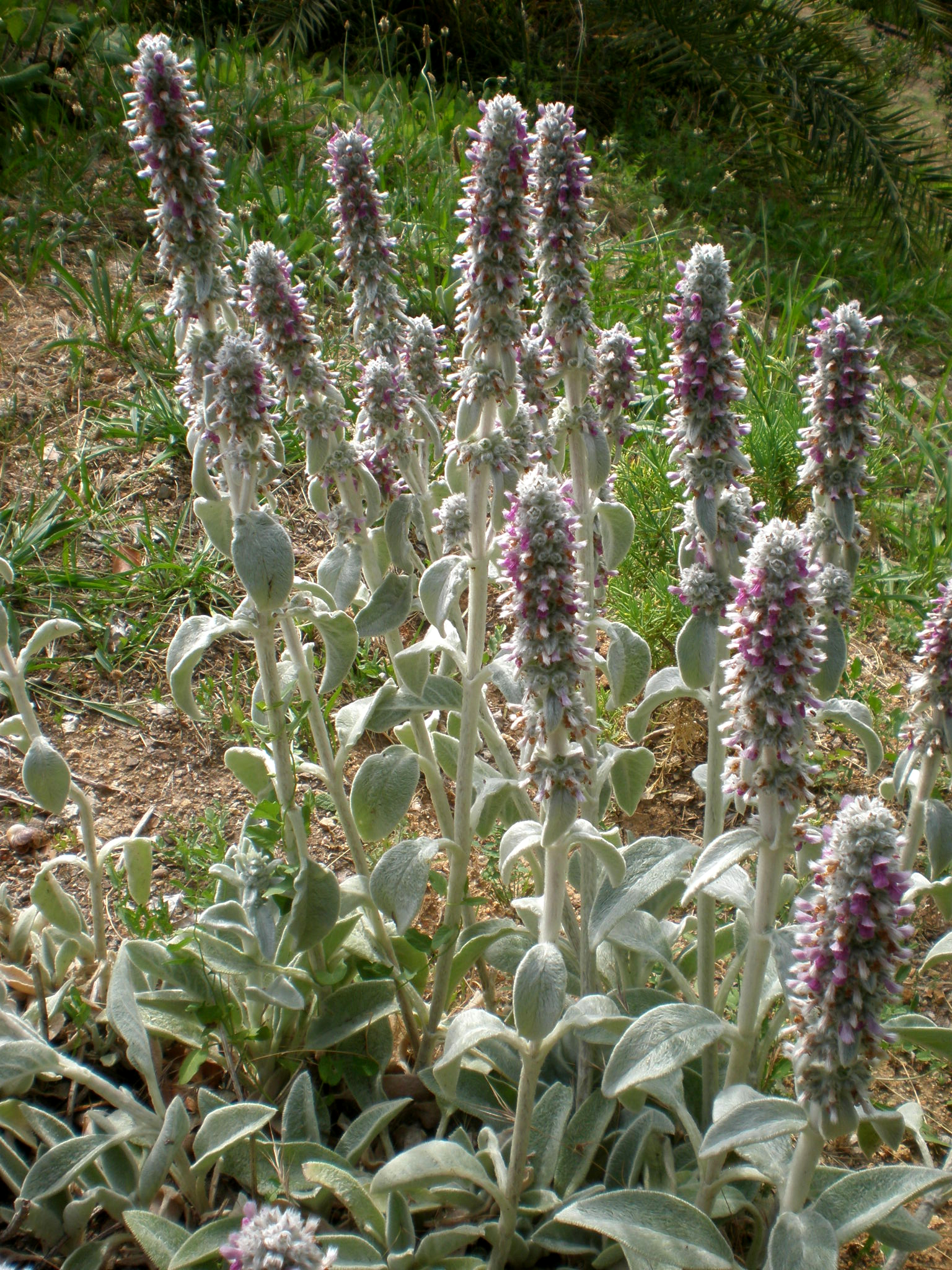 Jardín Botánico de Barcelona.